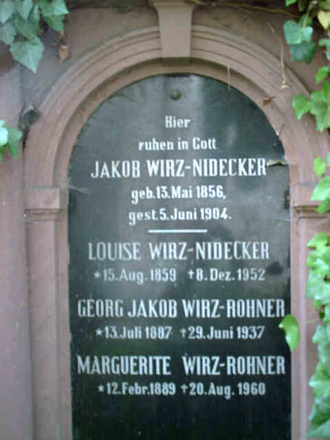 Familiengrab Wirz